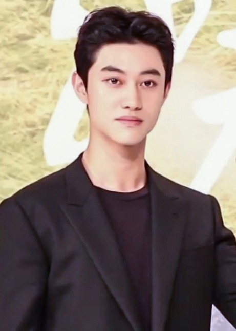 (TV10)왕이 되고 싶었던 박보검!